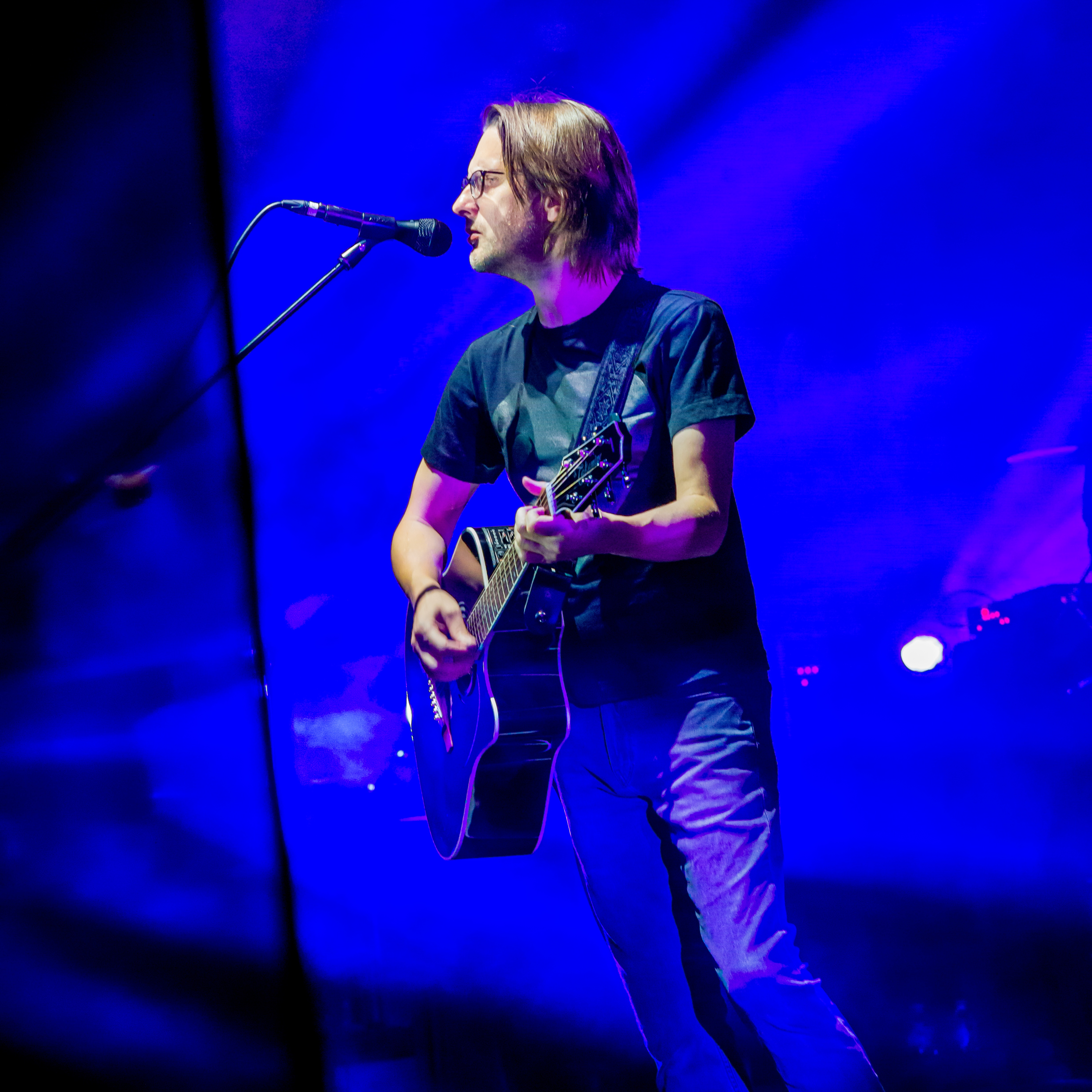 Bilder vom Zelt Musik Festival 2018 in Freiburg im Breisgau Das Eröffnungskonzert mit Steven Wilson